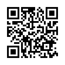 Enlace QR a Twitter CIP Oficial